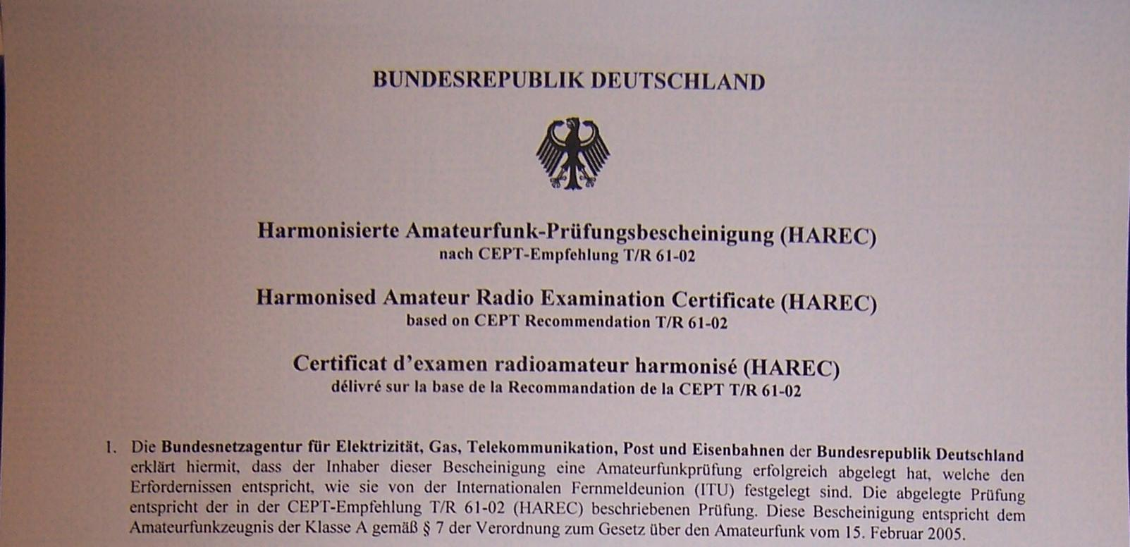 HAREC